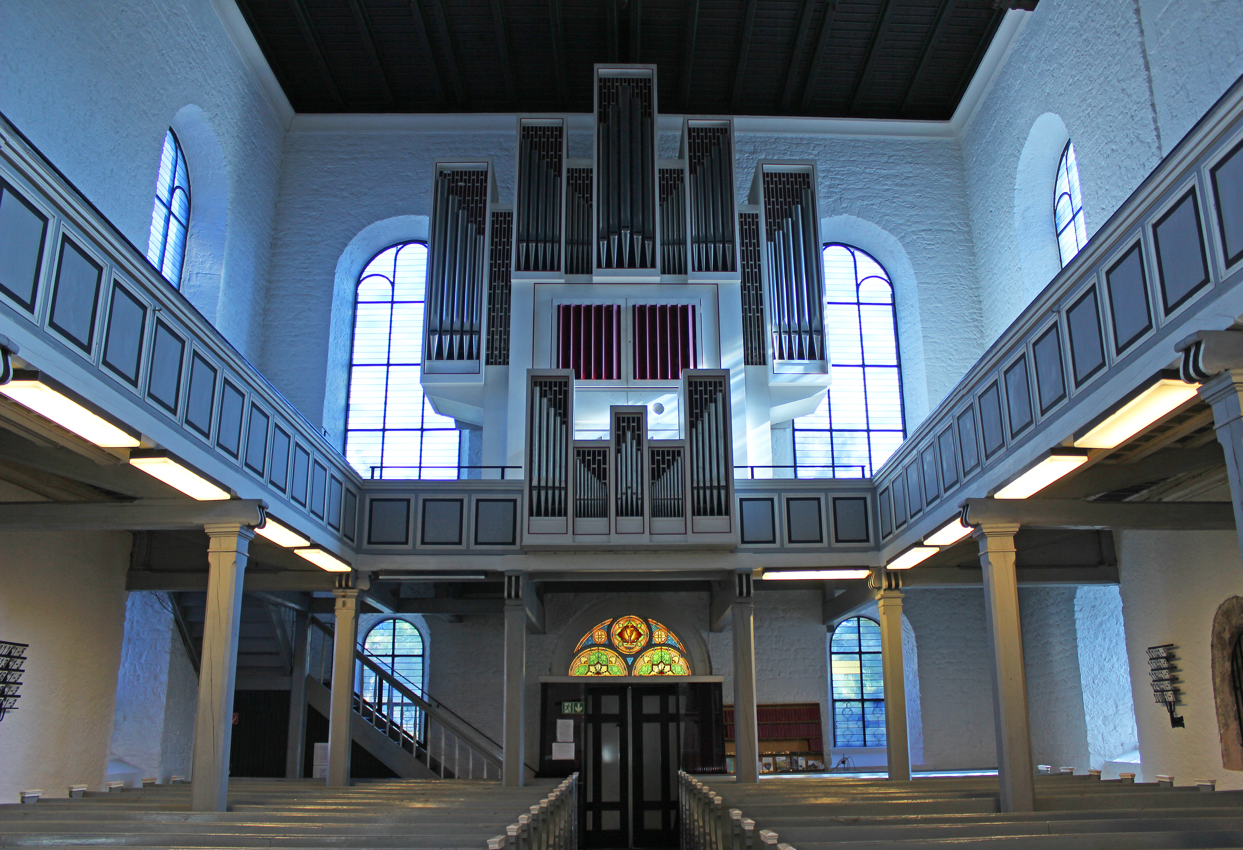 Blick ins Innere der Evangelischen Kirche in Wiebelskirchen, einem Stadtteil von Neunkirchen, Saarland.